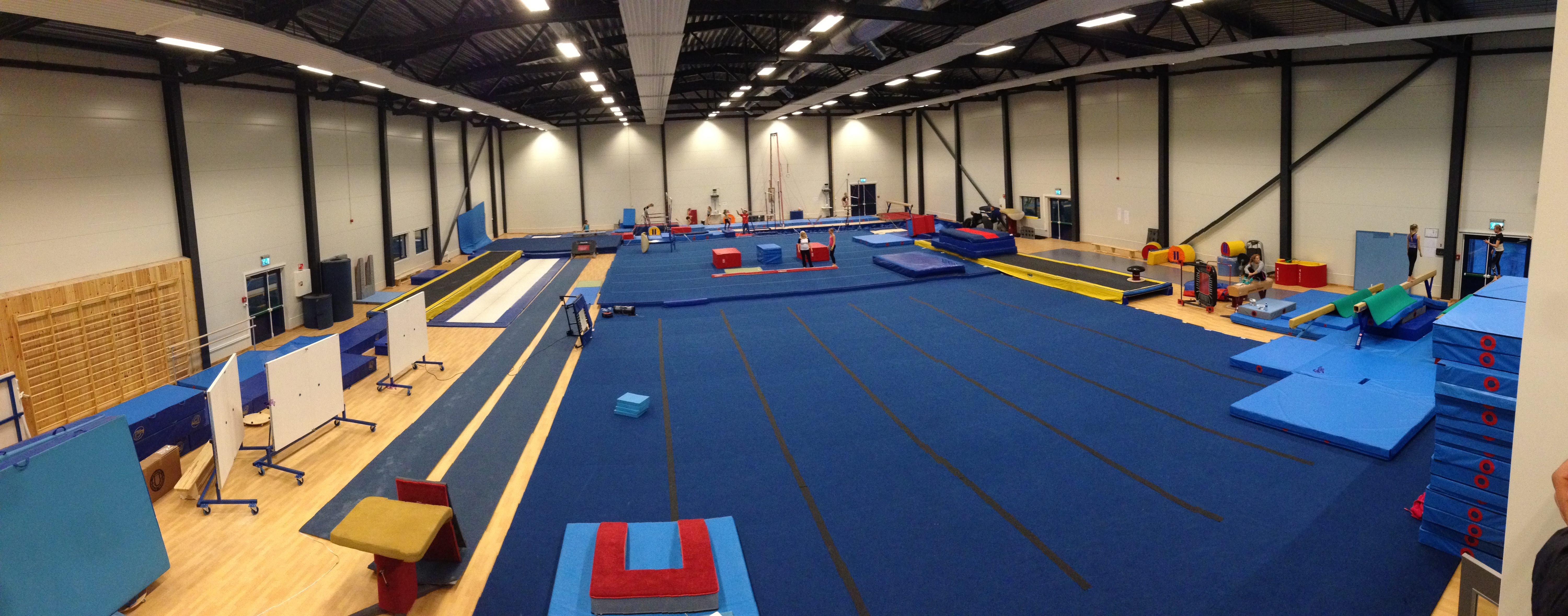 Holmen Turnhall, som ligger i Holmen Idrettspark i Asker kommune.